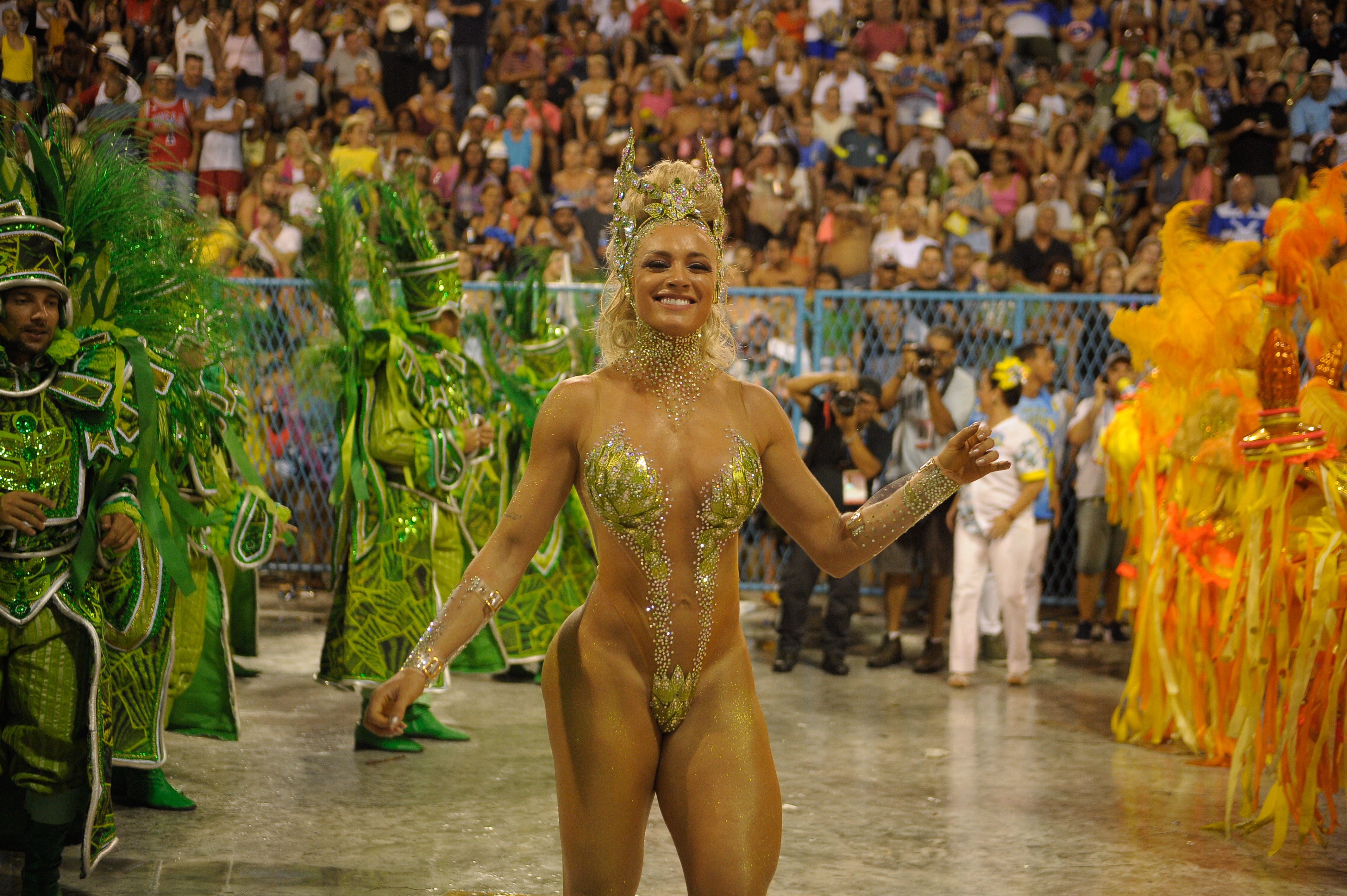 Rio de Janeiro - Unidos da Tijuca é a quinta escola a se apresentar na Marquês de Sapucaí, no desfile das campeãs, com o enredo Semeando sorriso, a Tijuca festeja o solo sagrado (Tomaz Silva/Agência Brasil)